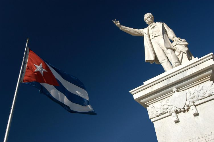 Cuba, september 2005, info in de Metadata